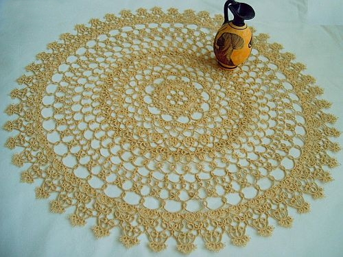 Serweta wykonana w technice frywolitki.